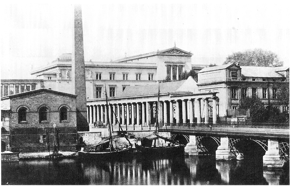 Berlin: Museumsinsel mit Maschinenhaus (rechts), alter Orangerie (hinter der Kolonnade), Badehaus und Friedrichsbrücke (rechts) sowie dem Neuen Museum (im Hintergrund).